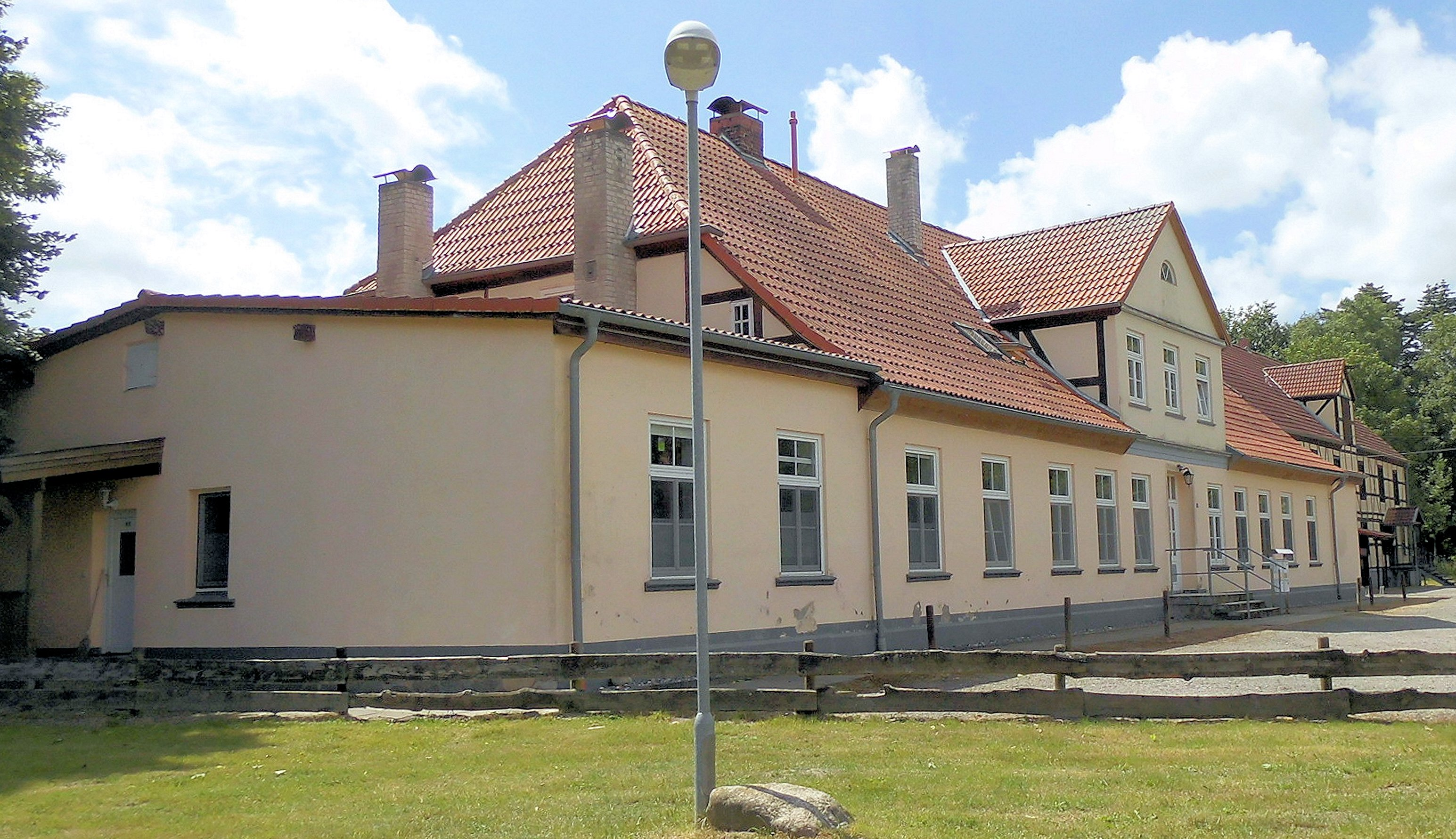 Gutshaus / Herrenhaus in Silenz, Gemeinde Kluis auf Rügen